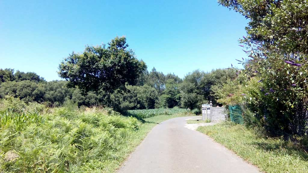 Vista da Hedreira, Curtis.